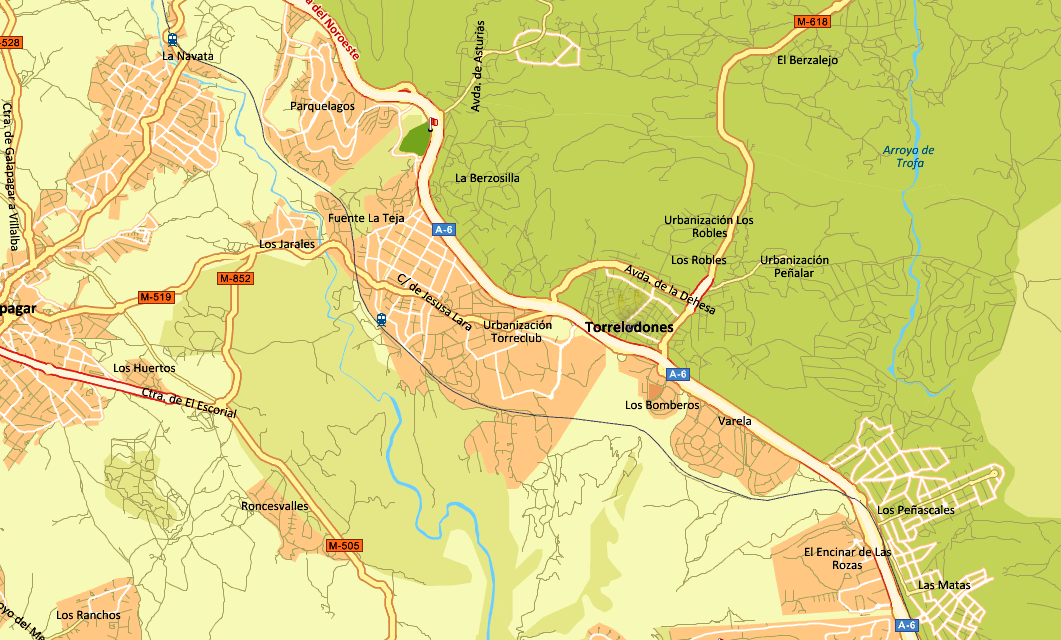 Torrelodones. Mapa.